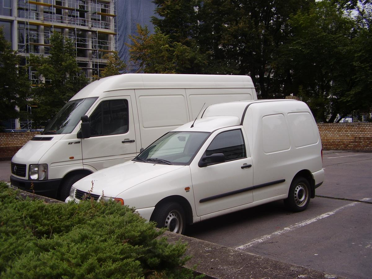 Volkswagen LT a Caddy pro porovnání při sobě.